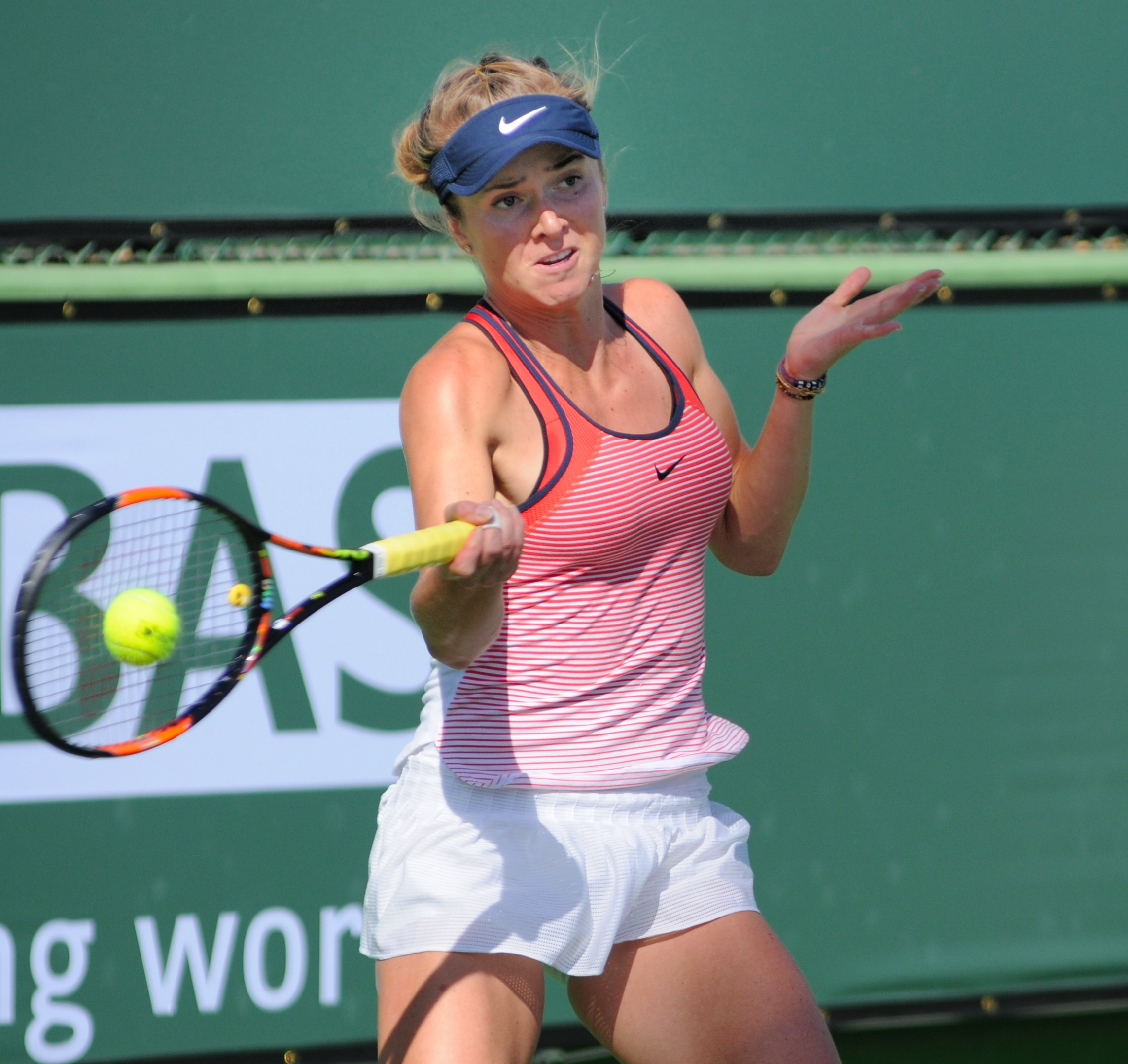 BNP Paribas Open 2016